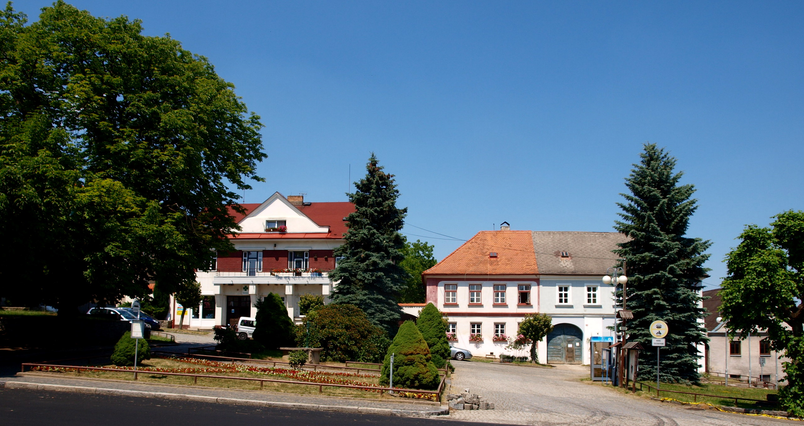 Divišov